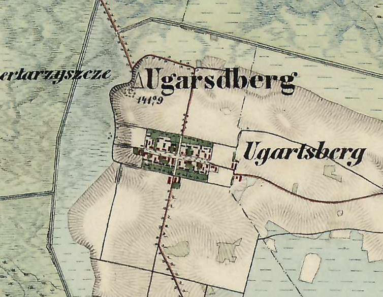 von Ugarte